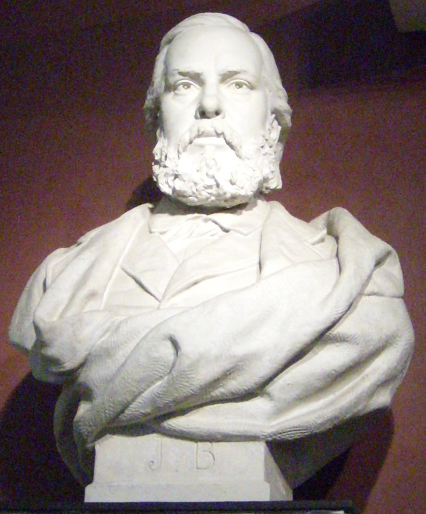 Buste de Jules Barni, député de la Somme